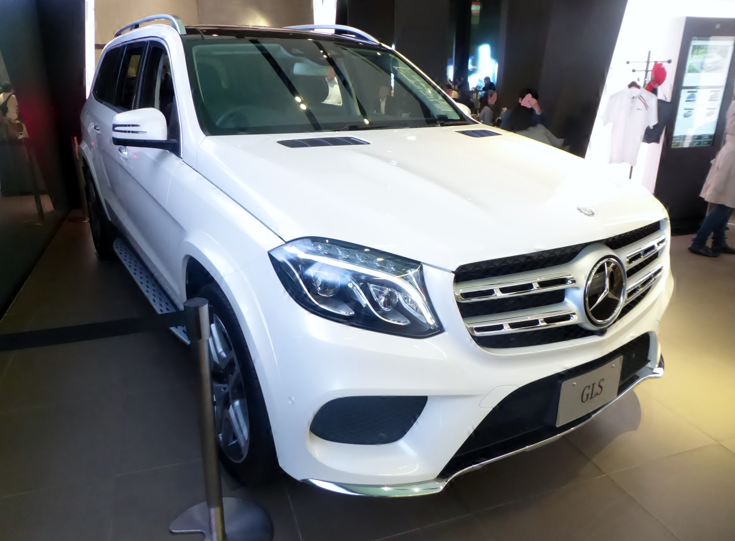 X166型メルセデス・ベンツ・GLS350d 4MATICスポーツをフロントから撮影。